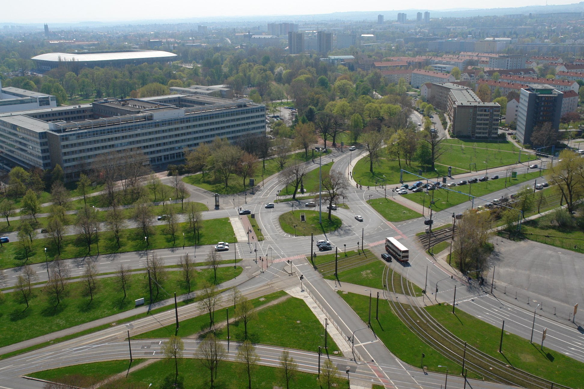 Der Dresdner Georgplatz aufgenommen vom Turm des Neuen Rathauses, links das Atrium I (Robotron-Gelände), ganz rechts das Studentenwohnheim St. Petersburger Str. 21.